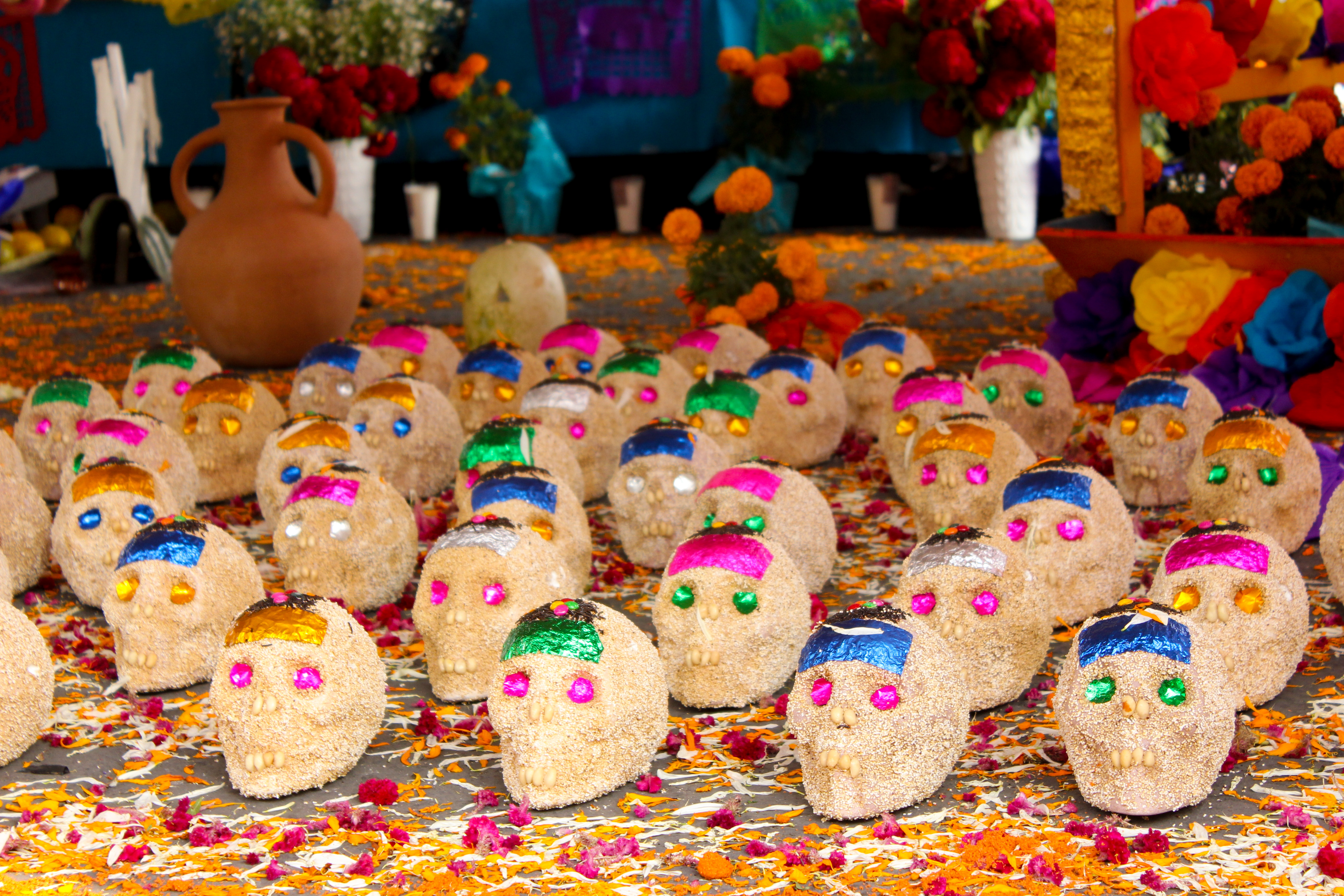 Calaveras dulces hechas de amaranto como celebración de la llegada de los muertos el 2 de Noviembre.